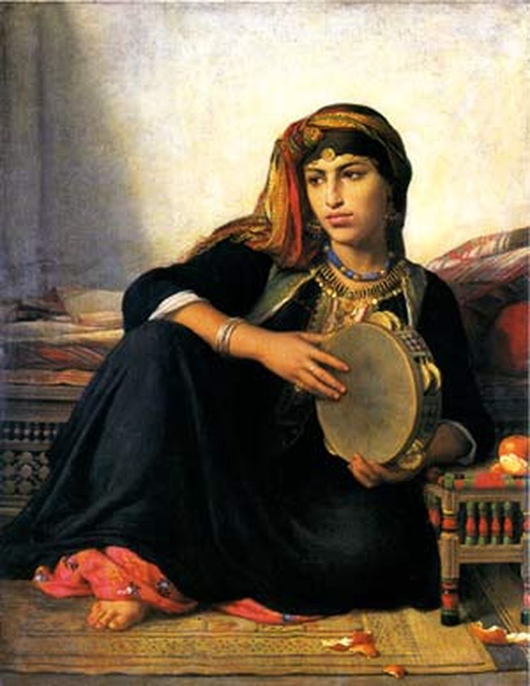 Joueuse de Tambourintitle QS:P1476,fr:"Joueuse de Tambourin" label QS:Lfr,"Joueuse de Tambourin" or